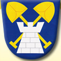 Česky: znak obce Kladníky